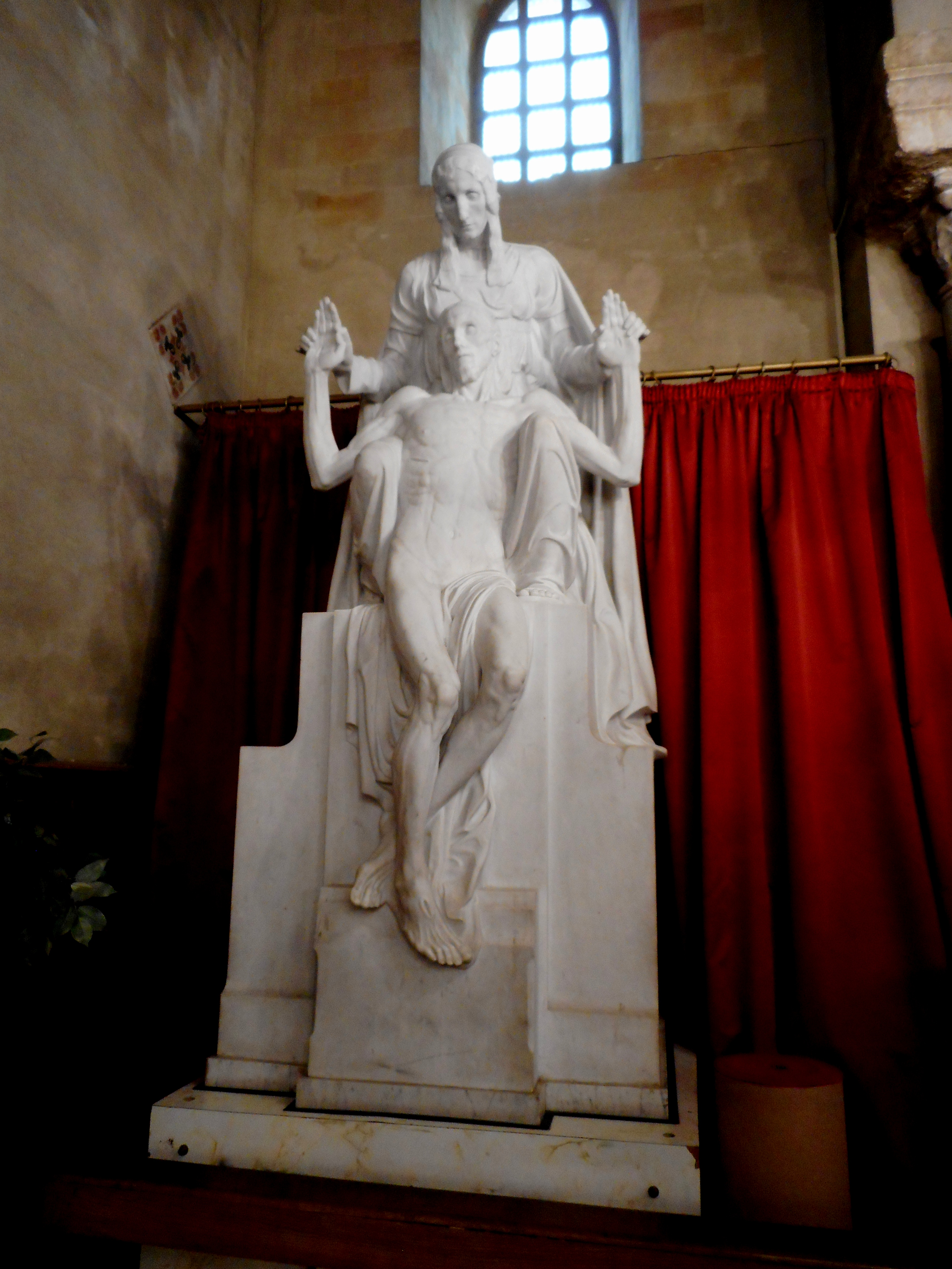 Pietà di Archimede Campini nella chiesa della Santissima Trinità o la Magione a Palermo